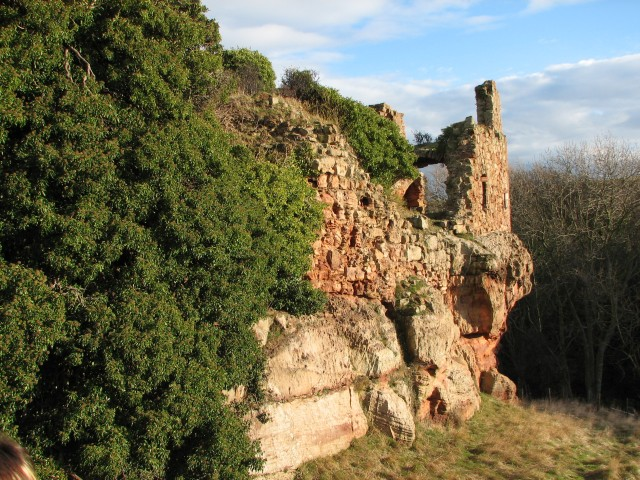 Innerwick Castle